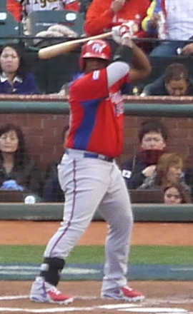 Carlos Rivera